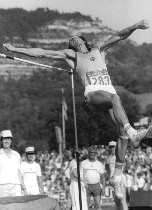 Gerd Wessig ADN-ZB Hirndorf 28.6.86 A-Bez. Gera: DDR-Leichtathletik-Meisterschaften in Jena. Sieger im Hochsprung wurde auf dem Ernst-Abbe-Sportfeld Gerd Wessig vom SC Traktor Schwerin mit einem Ergebnis von 2.30 m.